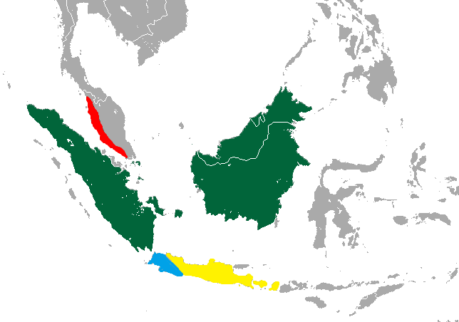 Distribution of Trachypithecus selangorensis (red), Trachypithecus cristatus (green), Trachypithecus mauritius (blue) and Trachypithecus auratus (yellow)